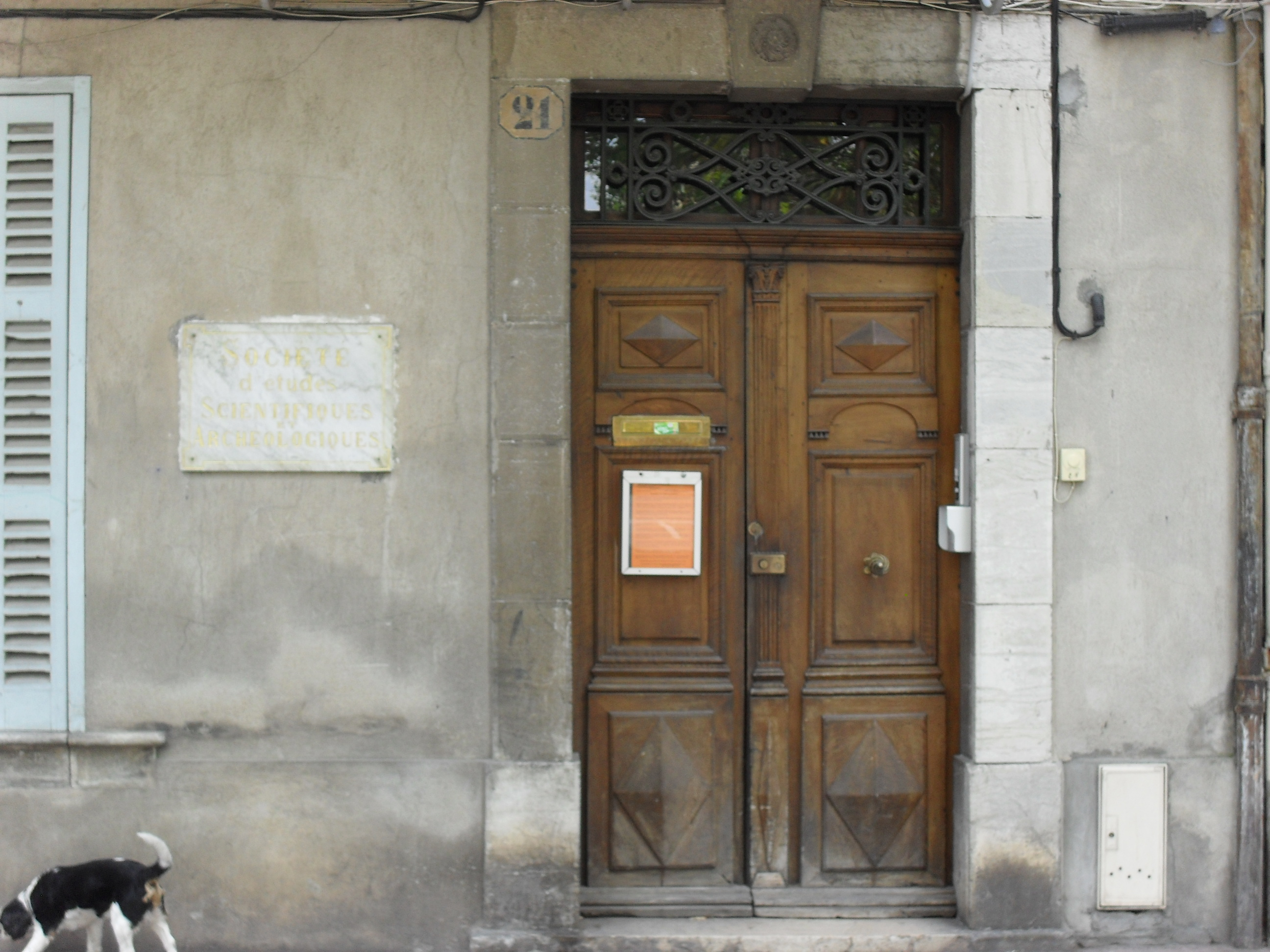 Entrée de la Société d'études scientifiques et archéologiques, vue depuis les Allées d'Azémar.